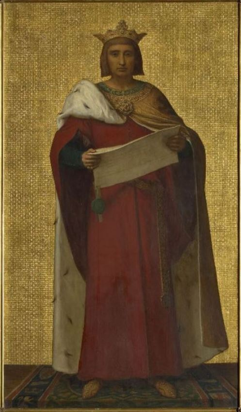 John II of Brabant, as depicted by Louis Gaillat for the hemicycle of the Belgian Senate